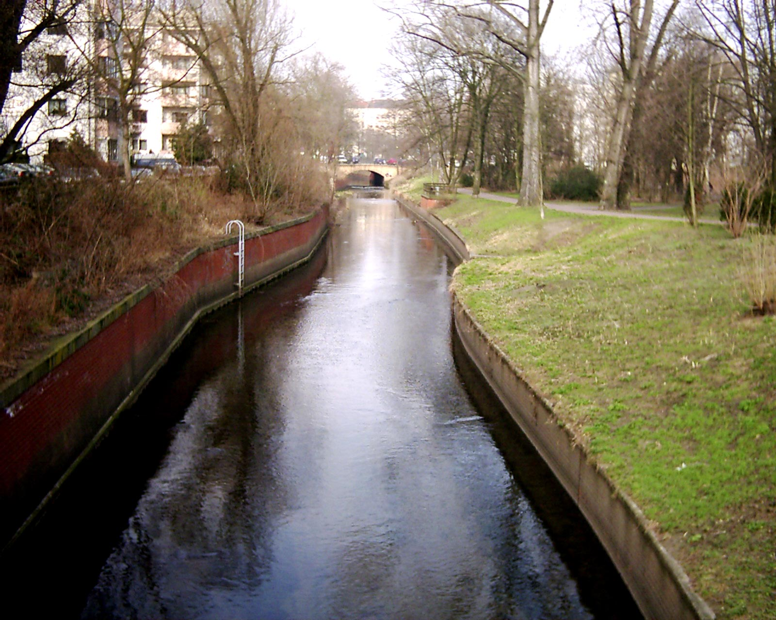 Die Panke unter der Schönwalder Straße.